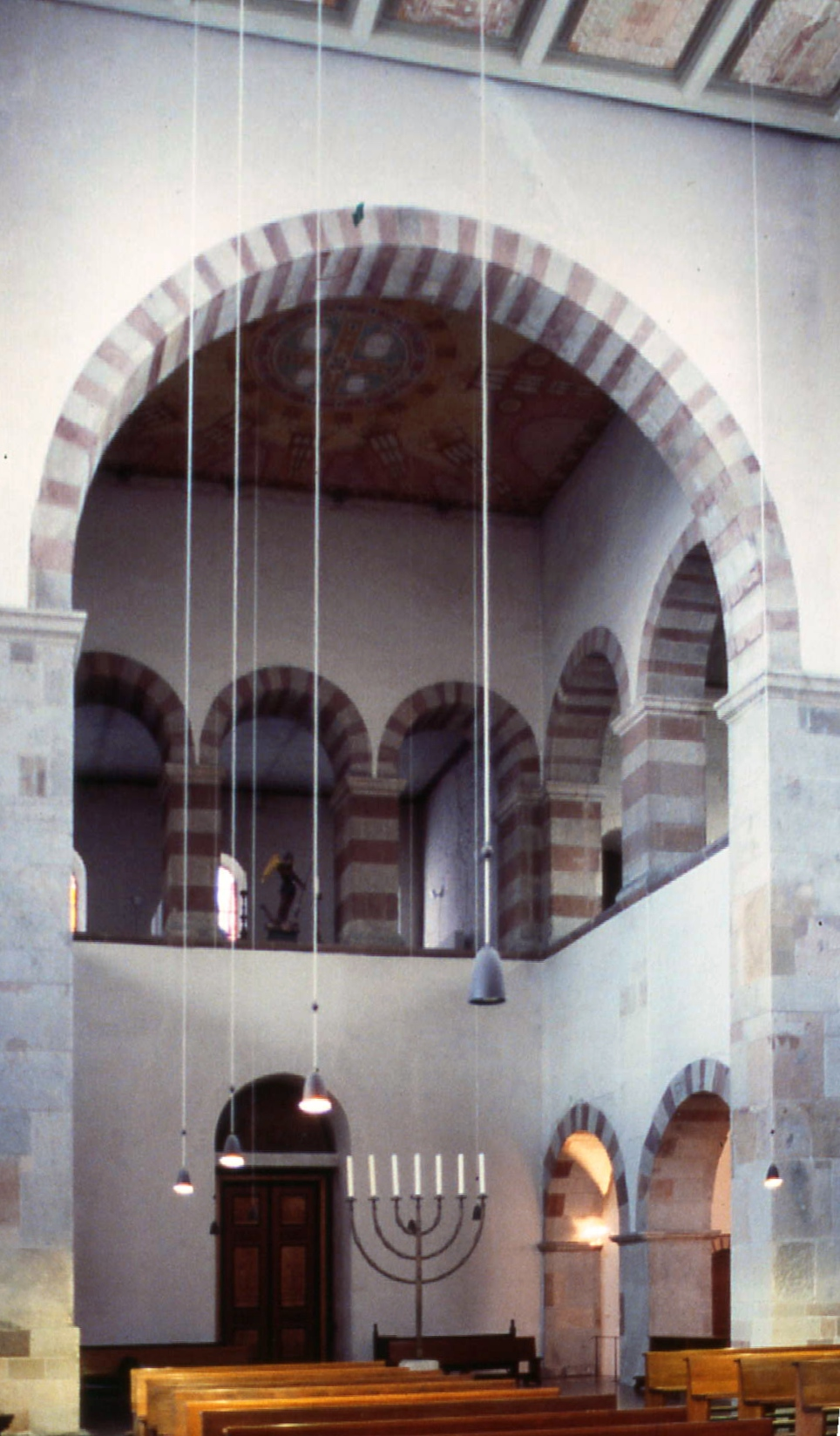 Köln St. Pantaleon, Langhaus nach West. Emporenöffnungen des Westwerks in den Kirchenraum.